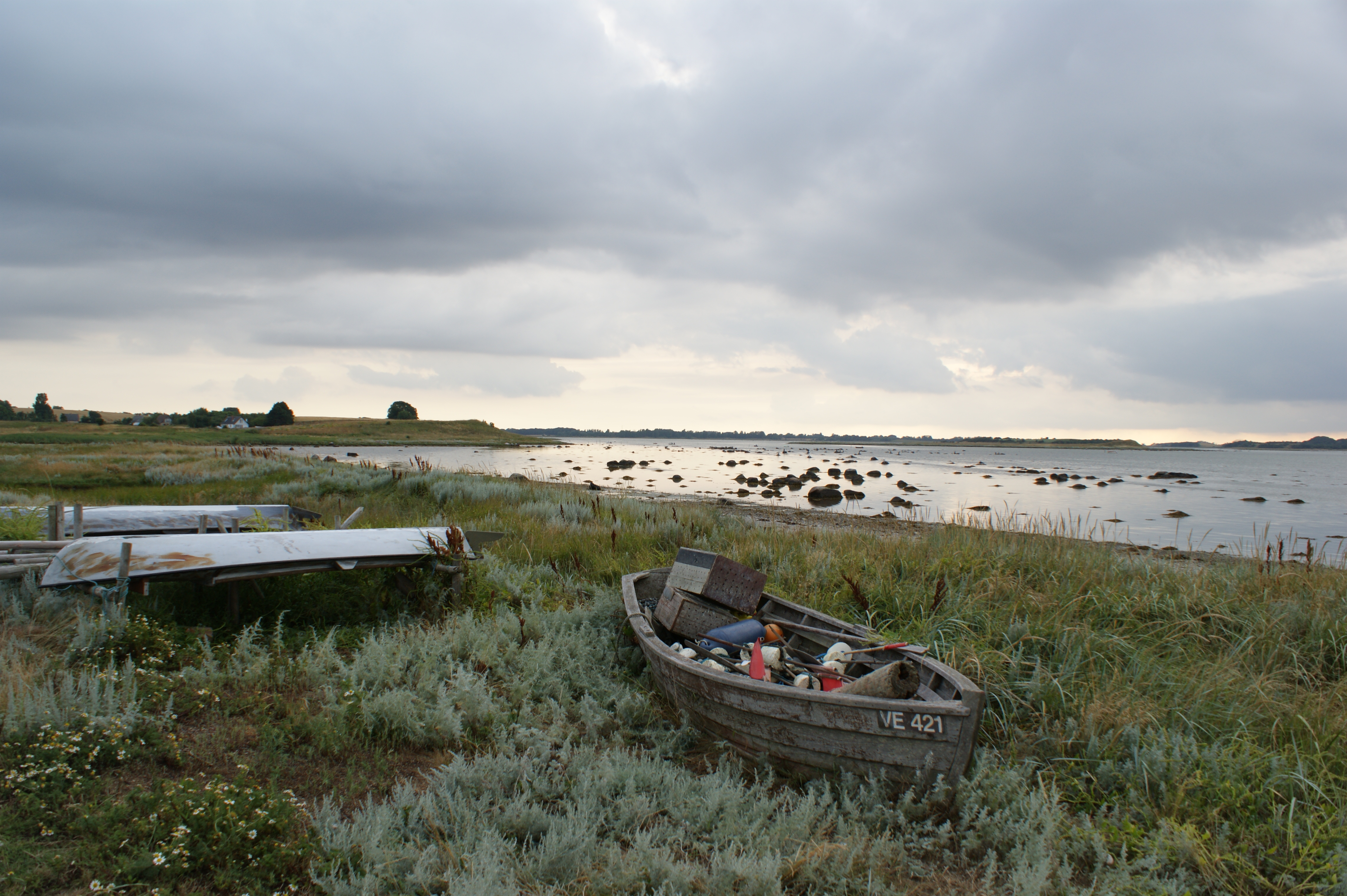 Stavns Fjord